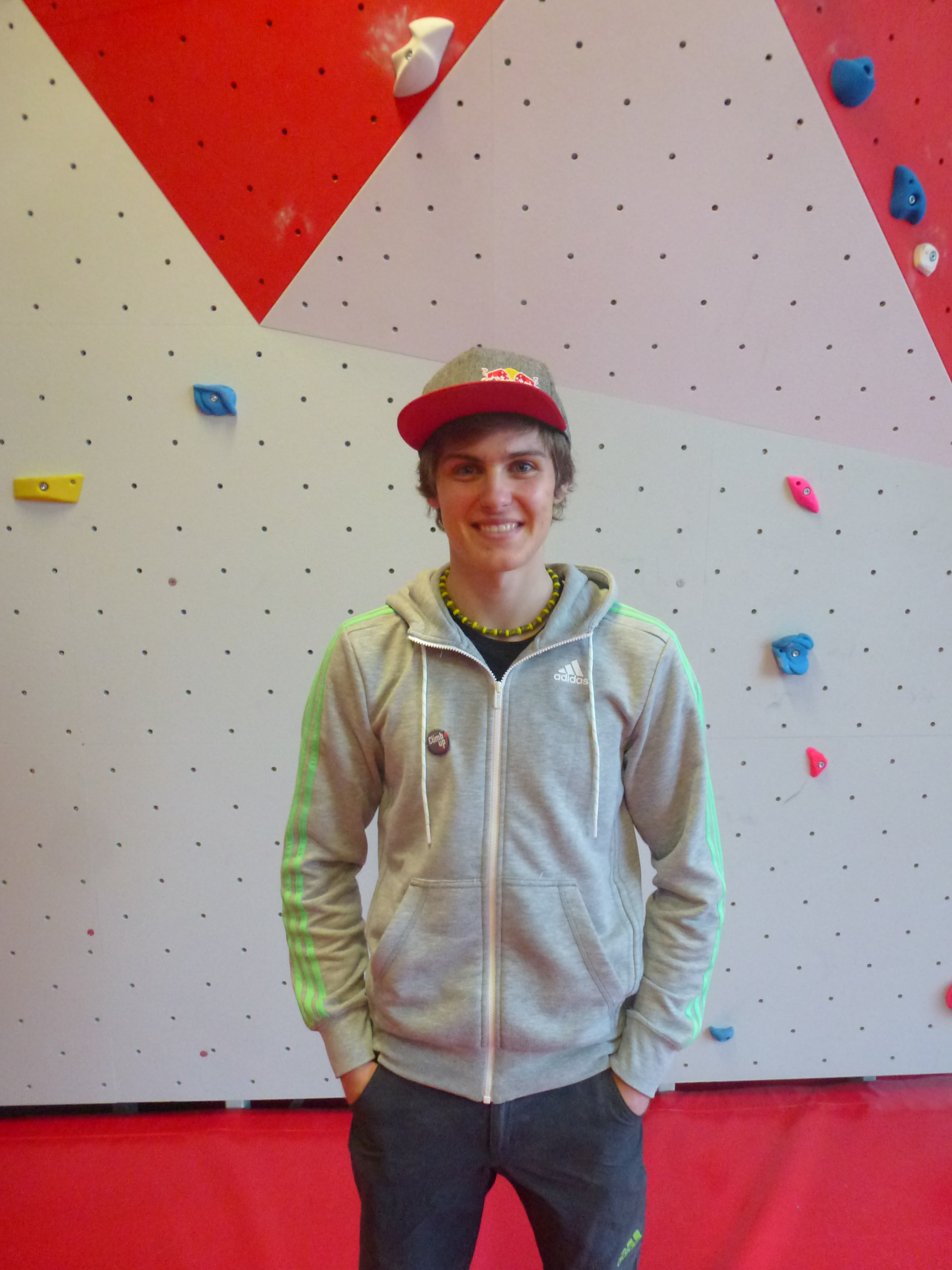 Domen Skofic le 2 avril 2015 à Climb Up Aix